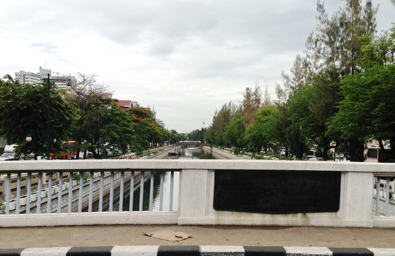 Phadung Krung,Kasem, wat Thepsirin,Pom prap Sattru Phai, bangkok